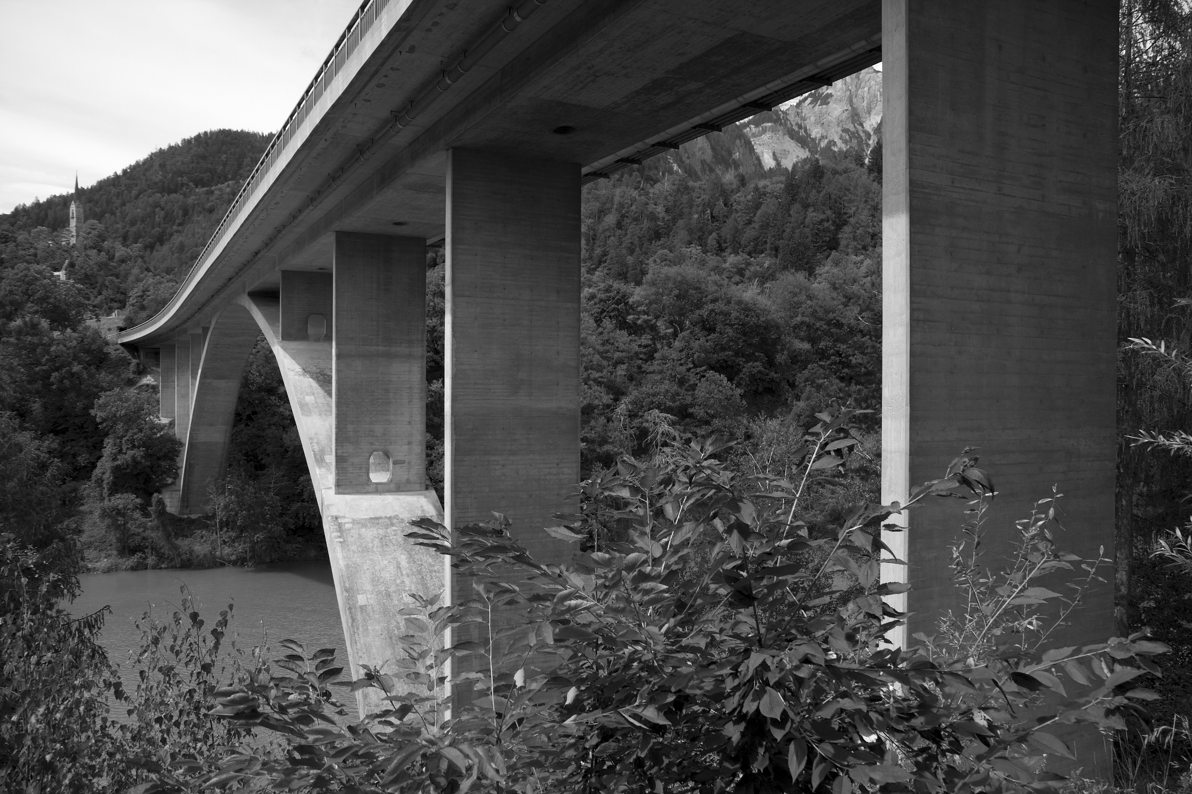 Rheinbrücke Tamins von Christian Menn, von unten gesehen